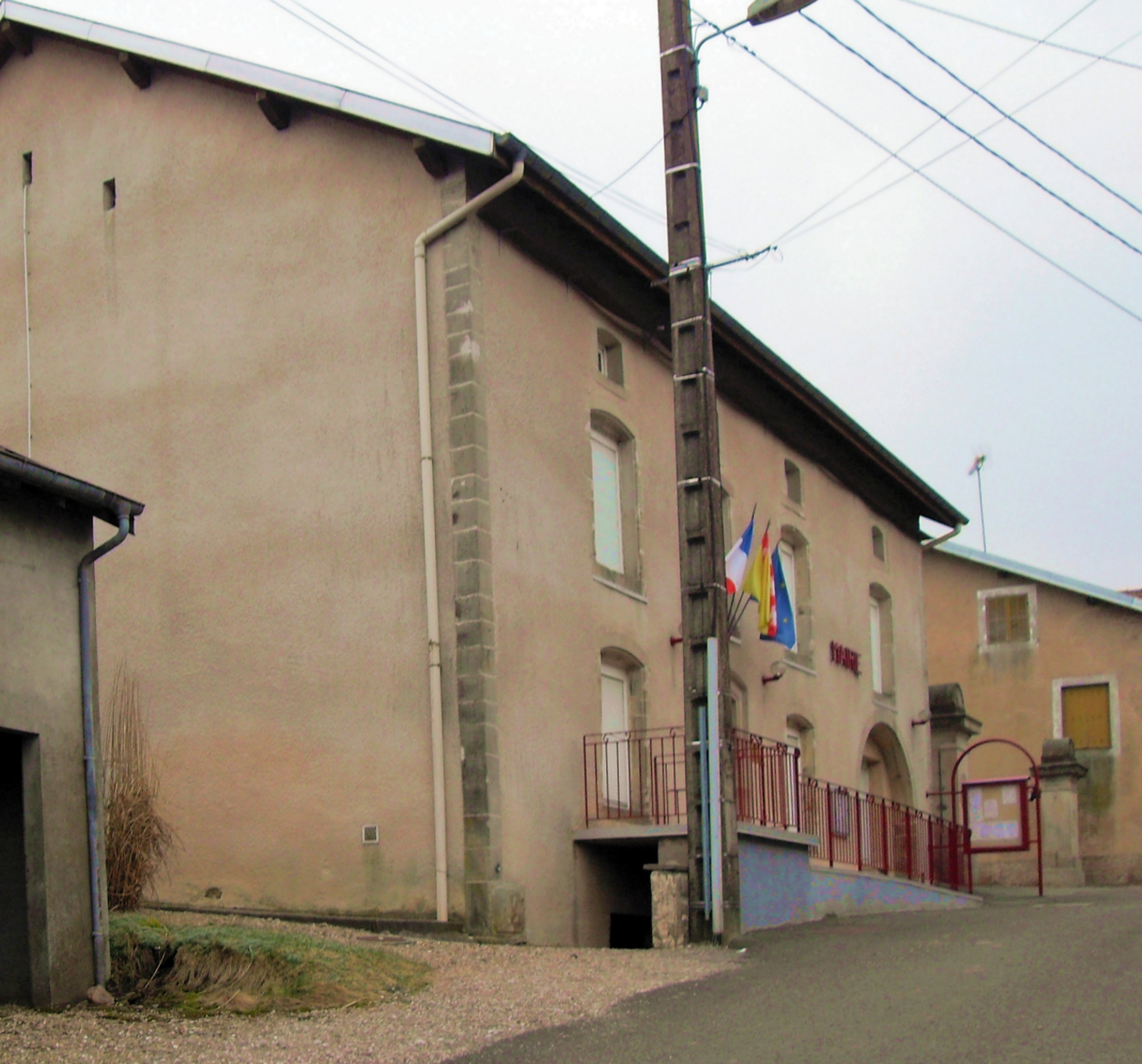 La mairie de Clerjus